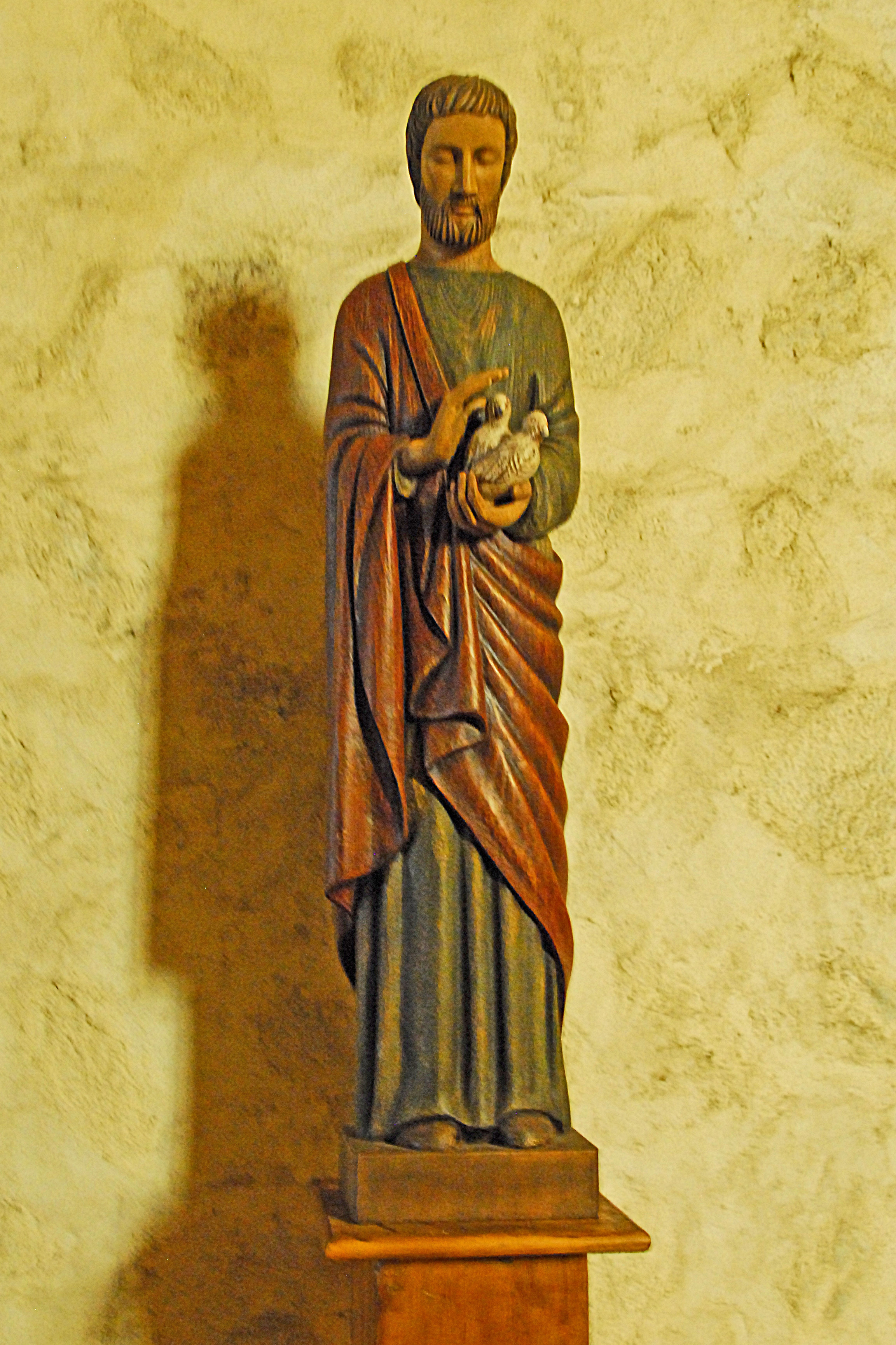 St-André-de-Sorède, Statue